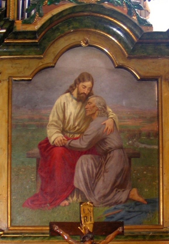 Friedrich Miess - Altar biserica Feldioara